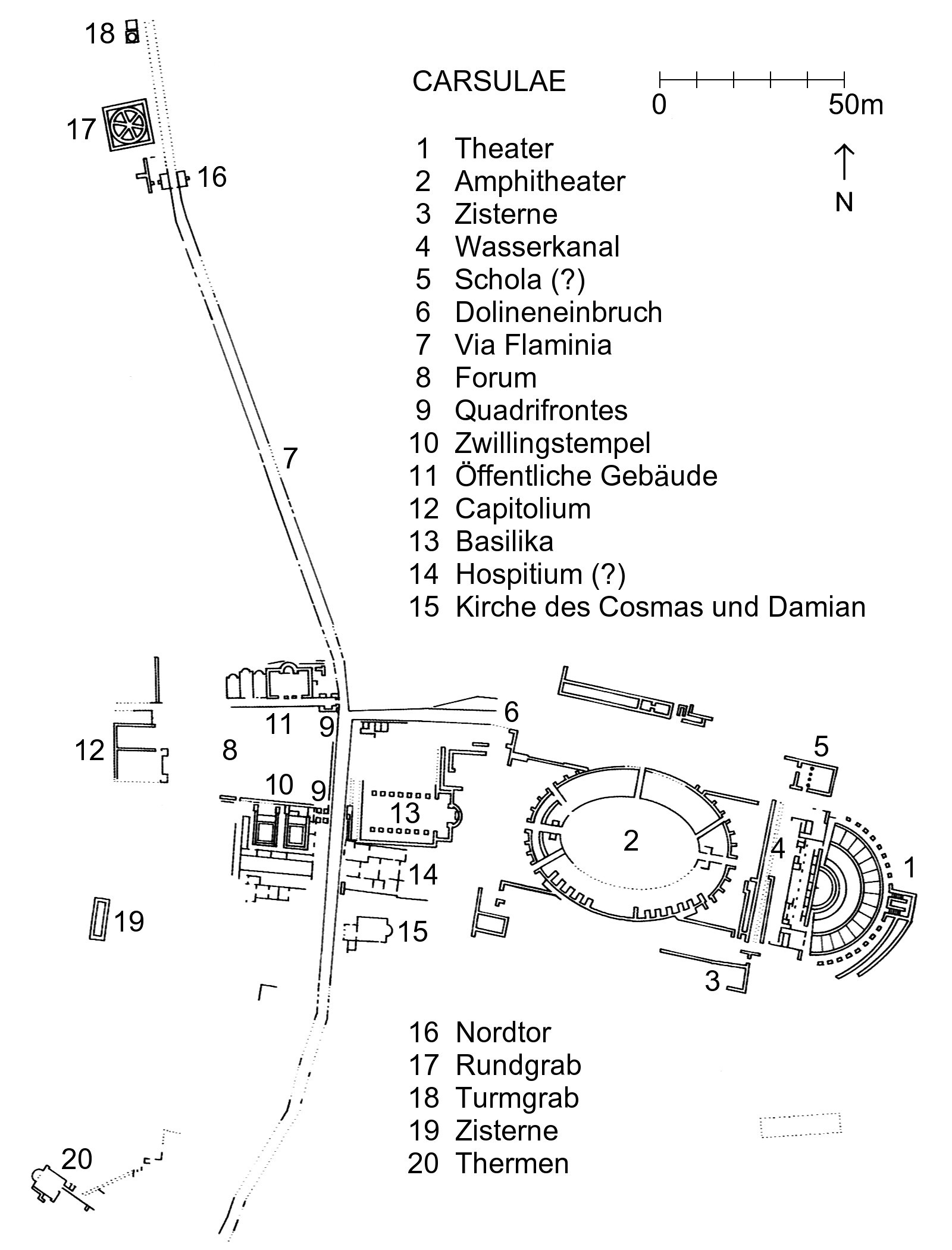 Carsulae: 1 Theater 2 Amphitheater 3 Zisterne 4 Wasserkanal 5 Schola 6 Dolineneinbruch 7 Via Flaminia 8 Forum 9 Quadrifrontes 10 Doppeltempel 11 Öffentliche Gebäude 12 Capitolium 13 Basilika 14 Hospitium 15 Kirche des Cosmas und Damian 16 Nordtor 17 Rundgrab 18 Turmgrab 19 Zisterne 20 Thermen